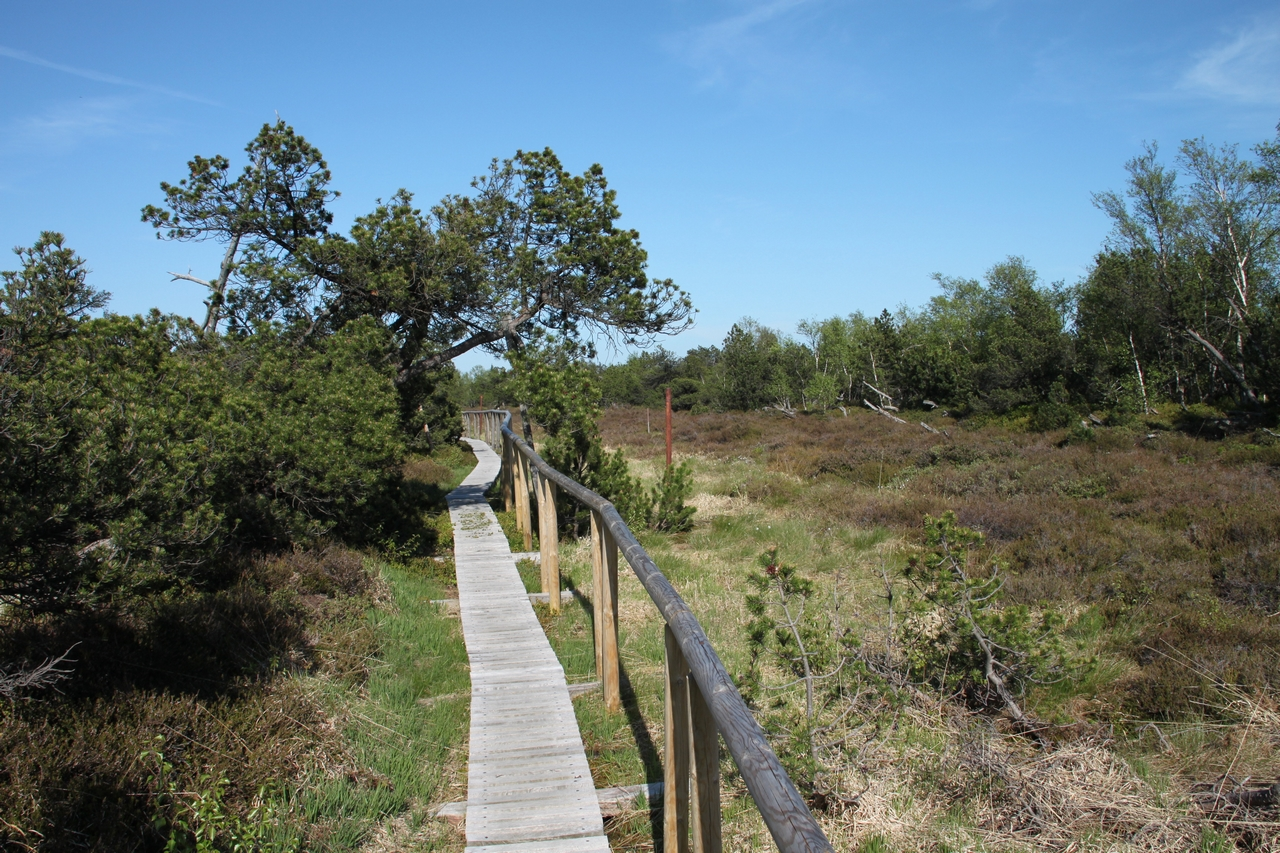 Bohlenweg im Georgenfelder Hochmoor nahe Zinnwald (Osterzgebirge), unmittelbar rechts vom Weg verläuft die deutsch-tschechische Grenze. Das Moor ist heute das Kerngebiet eines insgesamt 35 Hektar großen Areals, das als Natura 2000-Gebiet geschützt ist. Das Moor selbst in in einem Umfang von 12,45 Hektar als Naturschuzgebiet ausgewiesen. Die Schutzstellung beruht auf der Tatsache, dass das Georgenfelder Hochmoor das einzige größere Kammhochmoor im Osterzgebirge ist und den Lebensraum für zahlreiche gefährdeter Tier- und Pflanzenarten bildet.